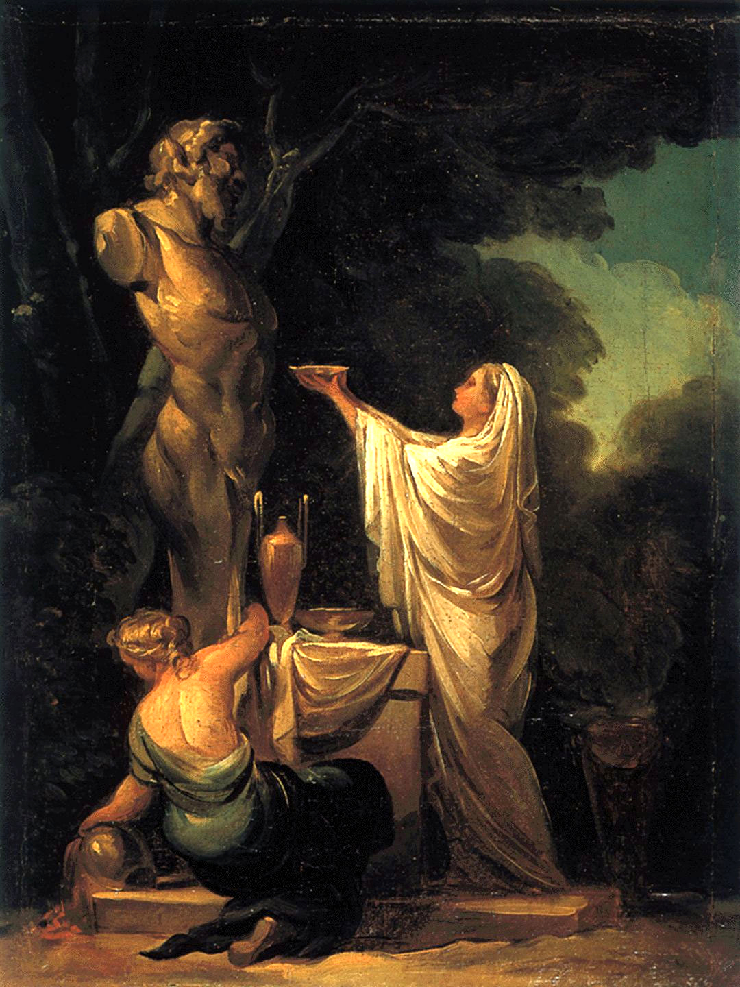 Francisco de Goya, Sacrificio a Pan, 1771. Óleo sobre lienzo. 33 x 24 cm. Colección José Gudiol (Barcelona, España).